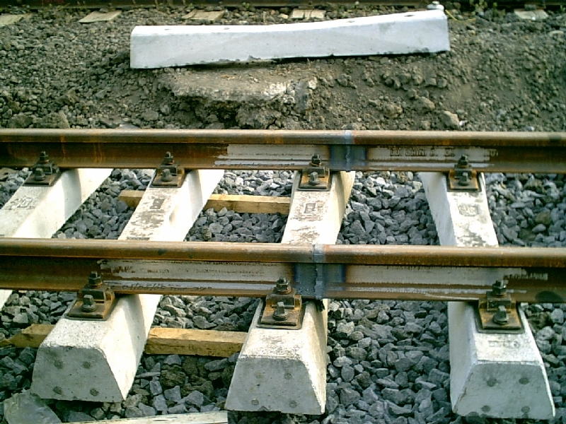 Saldatuta di rotaie 50 UNI